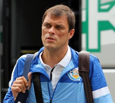 В'ячеслав Кернозенко — український футболіст та футбольний тренер.